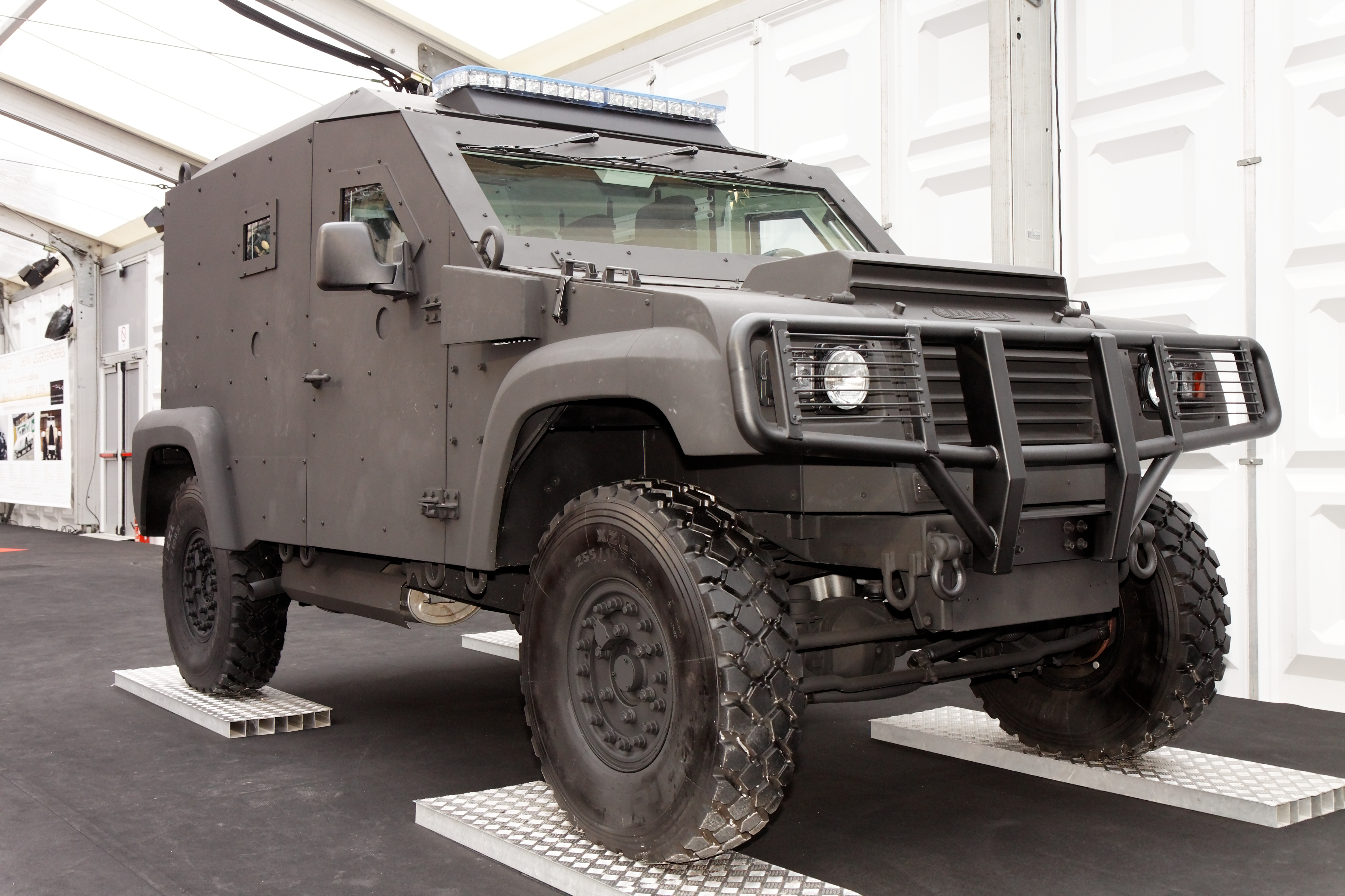 Le Panhard PVP APC exposé devant le dôme des Invalides lors du festival automobile international 2011.